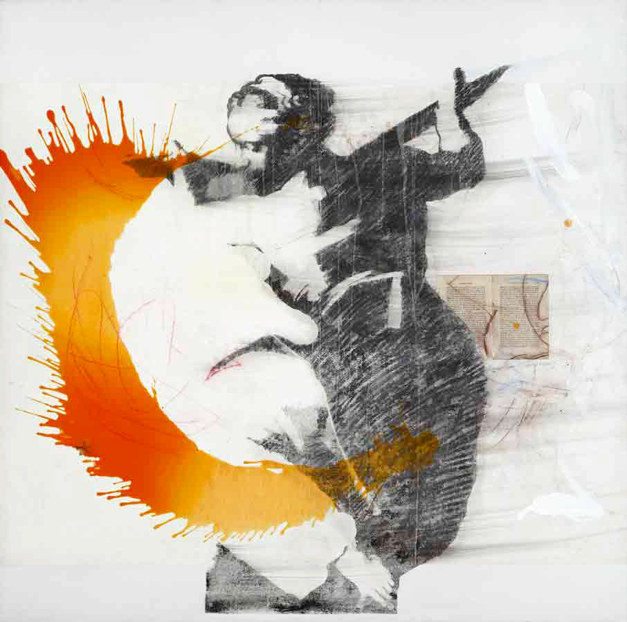 Art is revelation 3, 2007 T mixta sobre madera